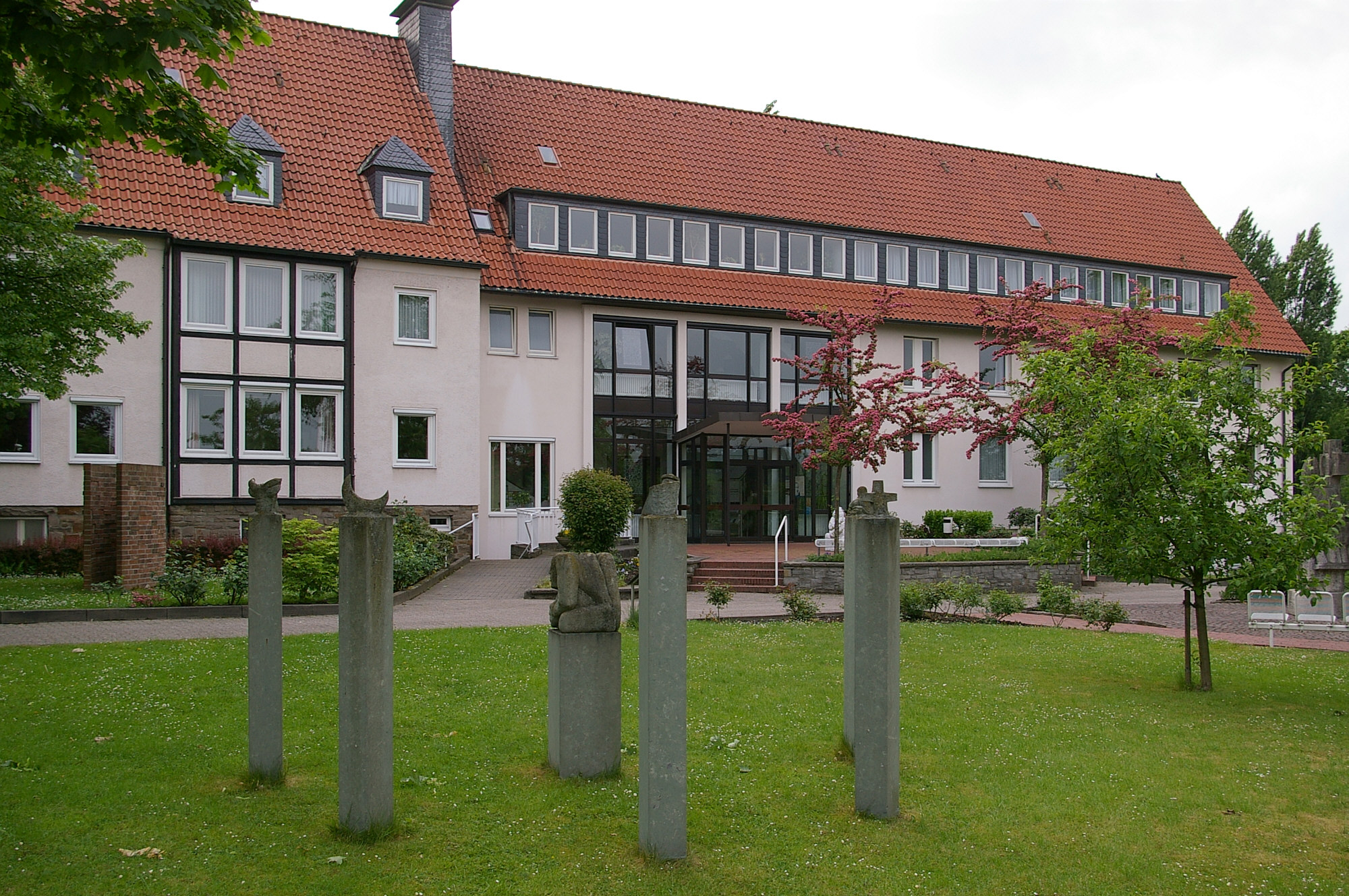 Kommende Brackel, Dortmund, Nordrhein-WestfalenThis is a photograph of an architectural monument. 0301